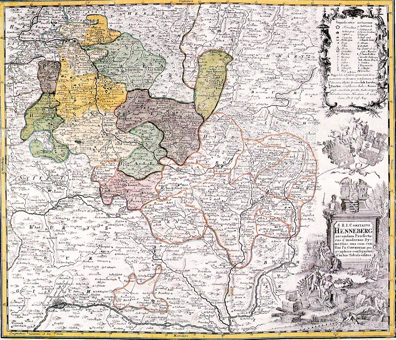 Ablichtung aus dem Hennebergischen Museum Kloster Veßra